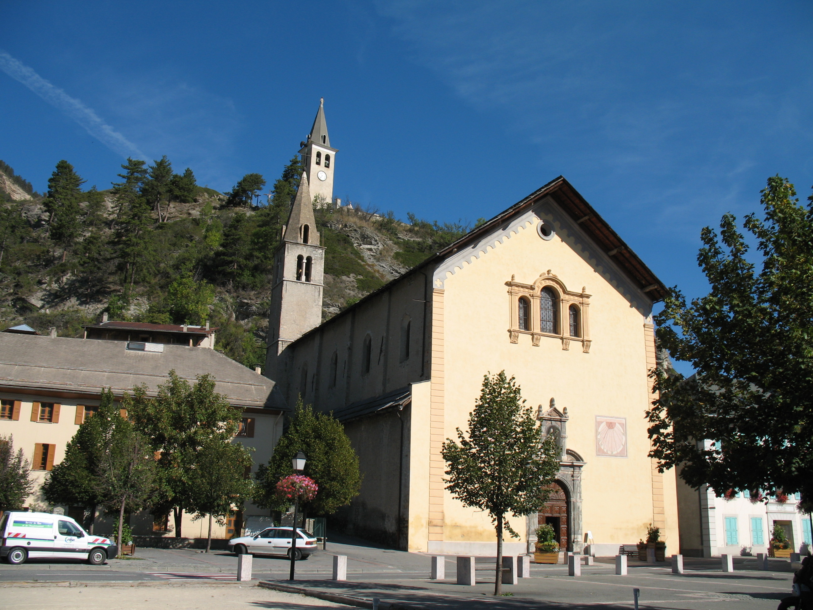 Jausiers, département des Alpes-de-Haute-Provence, France /4